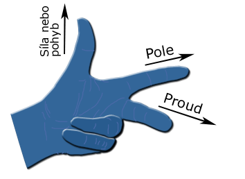 Czech version of an illustration of Fleming's left hand rule Česká verze kresby levé ruky, která demostruje Flemingovo pravidlo levé ruky